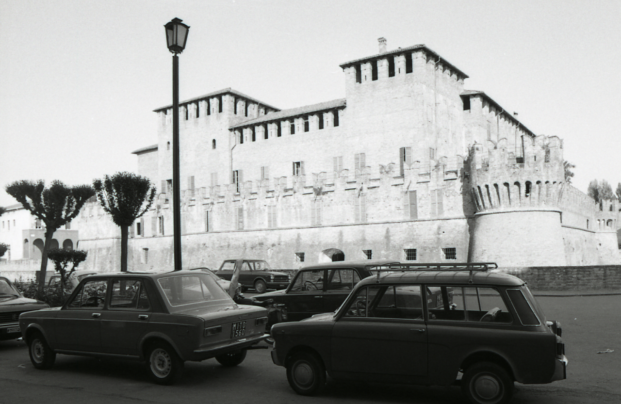 Servizio fotografico : Parma, 1976 / Paolo Monti. - Strisce: 6, Fotogrammi complessivi: 36 : Negativo b/n, gelatina bromuro d'argento/ pellicola ; 35 mm. - ((Sul portanegativi: N[I]K[MA]T FP4. - Occasione: Documentazione monumenti artistici Emilia-Romagna. - Fonte: Agenda di Paolo Monti: Leica 1501-3000 Controllo numerazione (1950-1978), presso Archivio Paolo Monti. - Fonte: Fattura di Paolo Monti: IV. Commesse/ Fattura n. 09/ Fotografie monumenti artistici Emilia-Romagna (1976/07/05), presso Archivio Paolo Monti